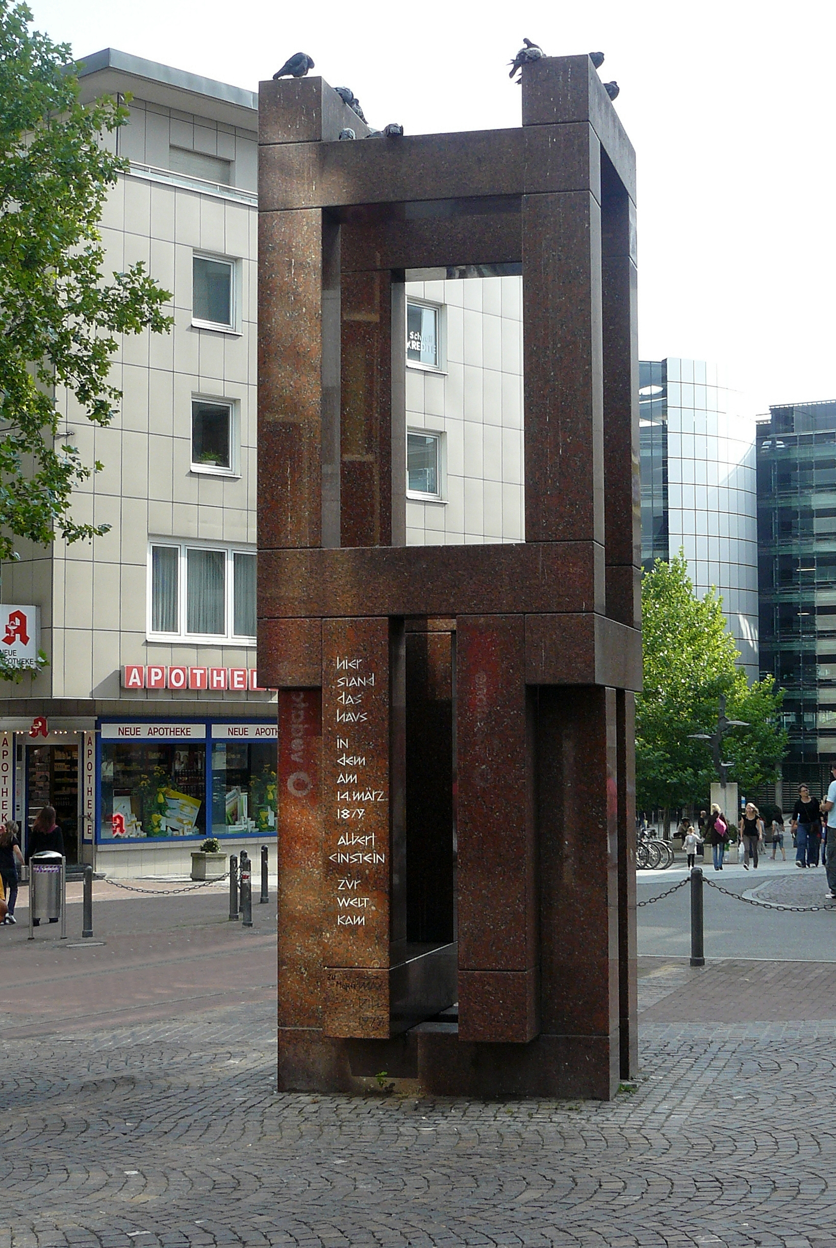 Denkmal in Ulm an dem Ort, wo das Geburtshaus Albert Einsteins stand